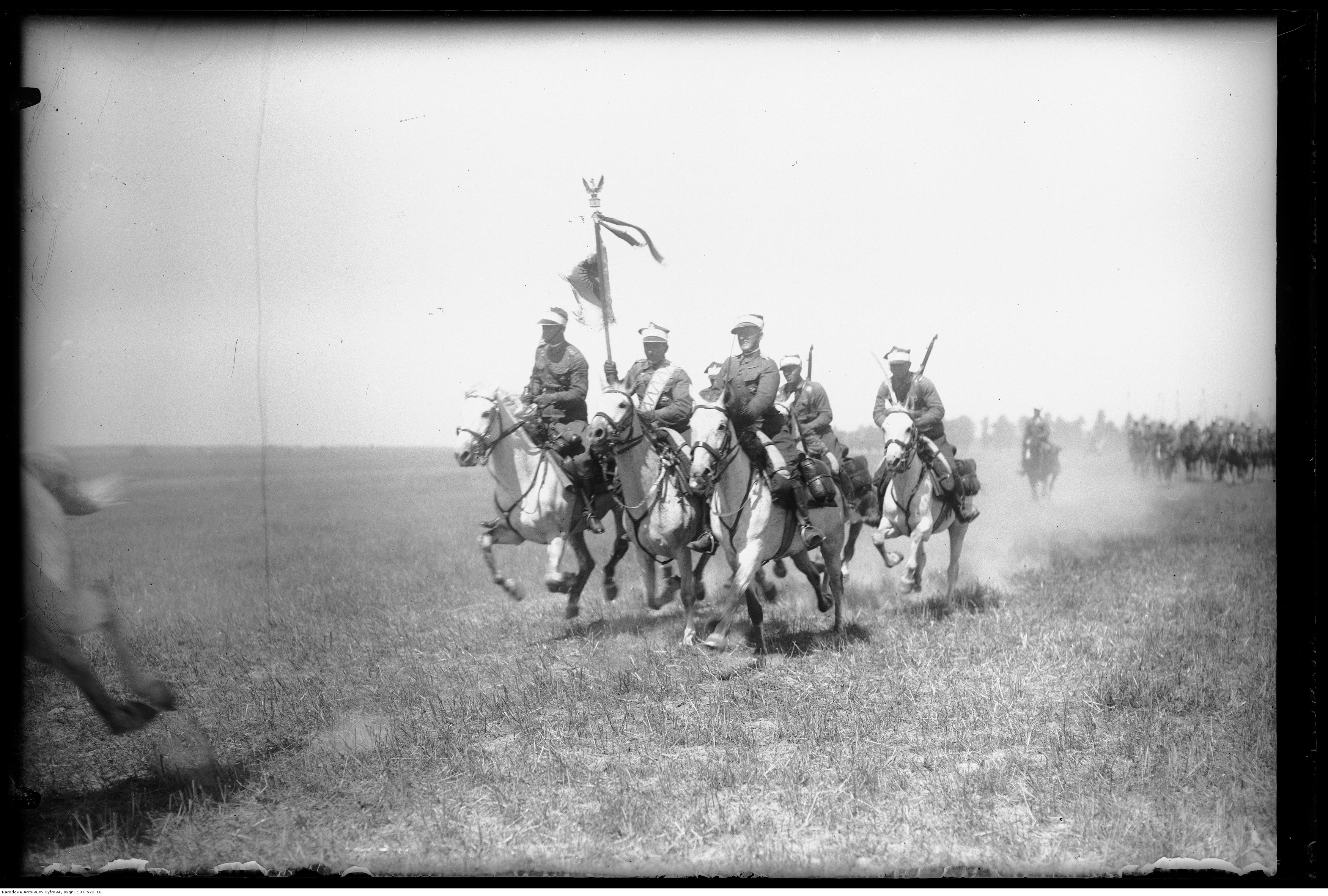 Defilada 11 Pułku Ułanów. Na przedzie poczet sztandarowy.